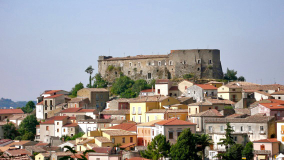 Veduta del castello di Ceppaloni (BN) in cima al paese